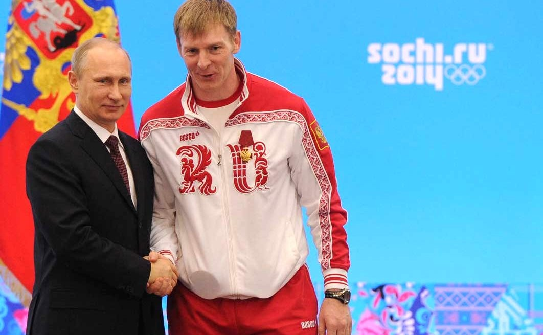 Орденом «За заслуги перед Отечеством» четвёртой степени награждён двукратный олимпийский чемпион в бобслее Александр Зубков.